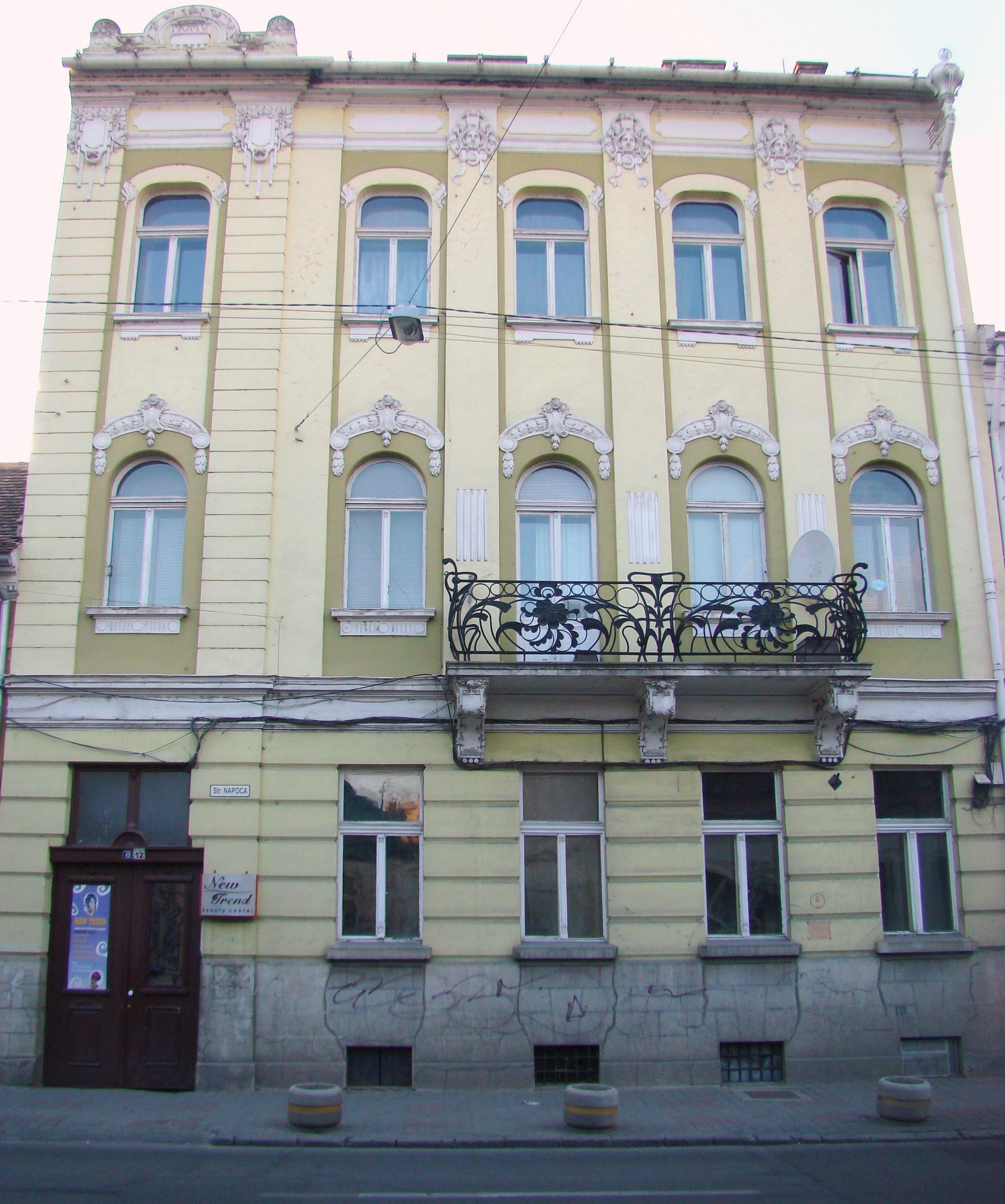 Clădire monument istoric, str. Napoca 12